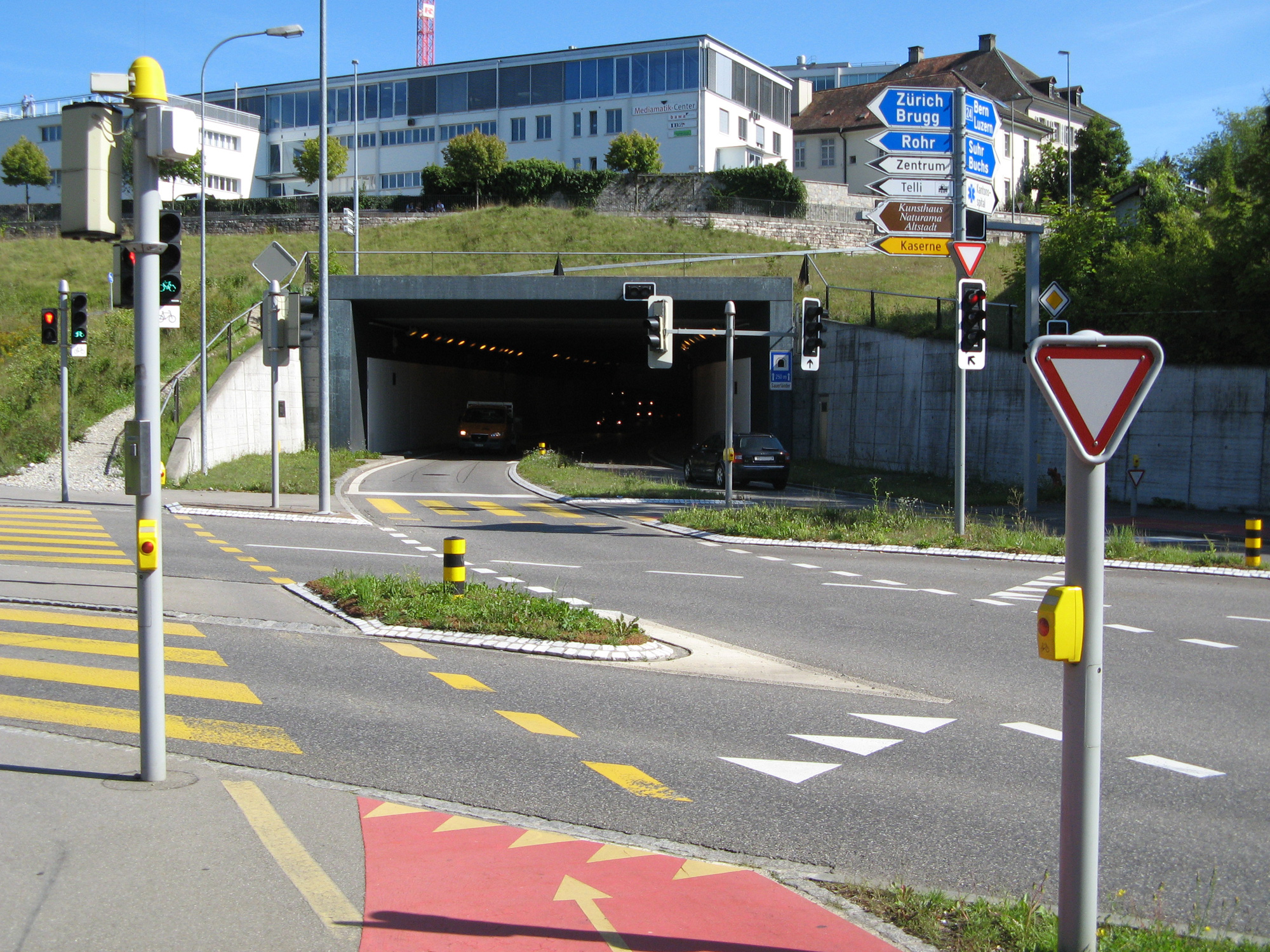 Sauerländertunnel in Aarau, Portal Mühlemattstrasse